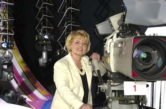 Silvia Arzuffi a Paperissima